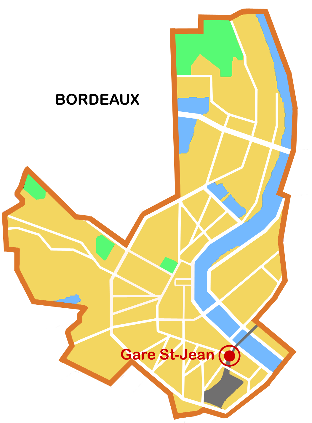 Localisation de la gare Saint-Jean à Bordeaux / Position of Saint-Jean Station in Bordeaux.